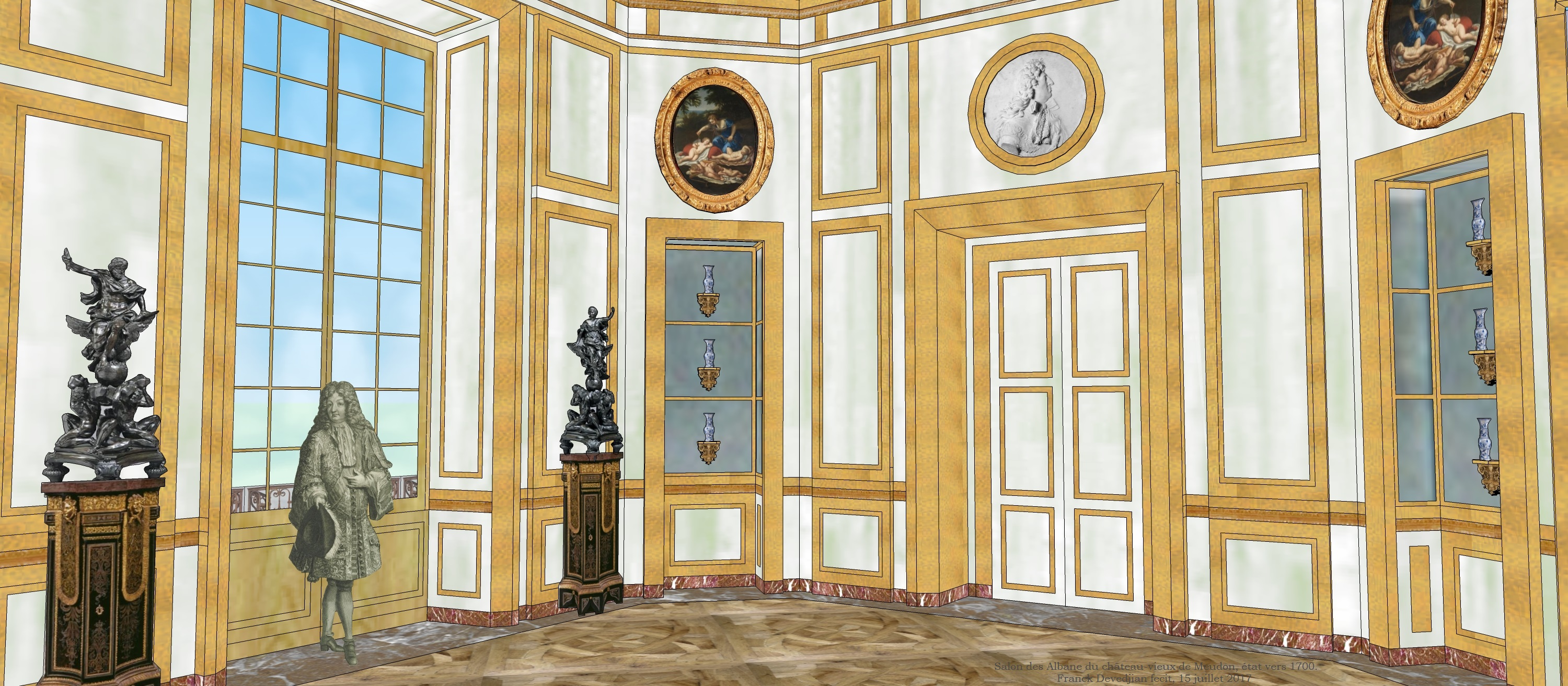 Essai de restitution du Salon des Albane, situé au bout de la galerie du château-vieux de Meudon, premier étage. Vers 1700.